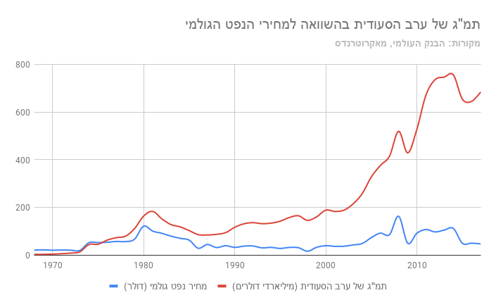 השוואה בין התמג של סעודיה למחירי הנפט הגולמי בשנים 1970-2017